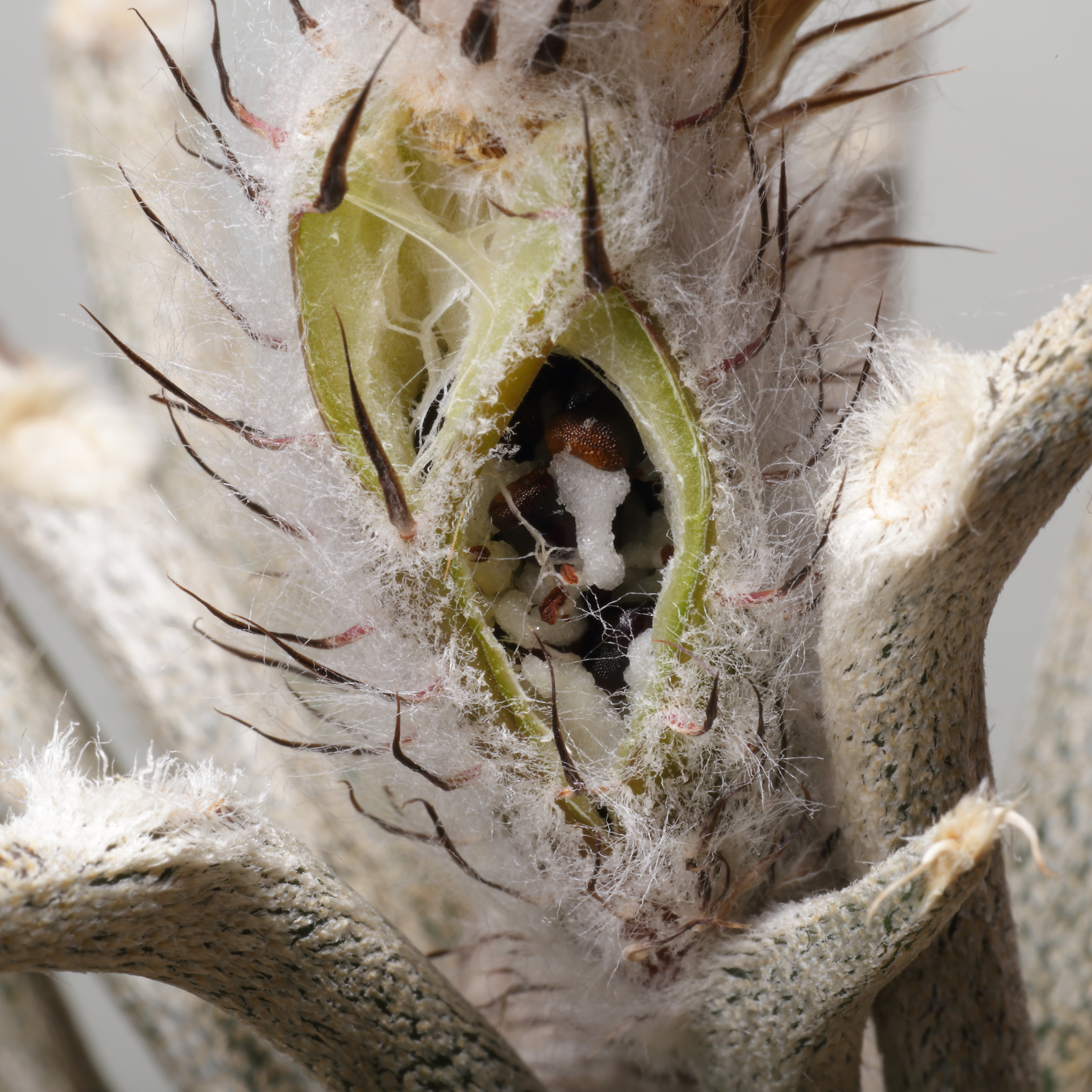 Astrophytum caput-medusae. Närbild på en mogen och uppsprucken frukt med frön i.